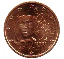 1 euro cent 1999 francia